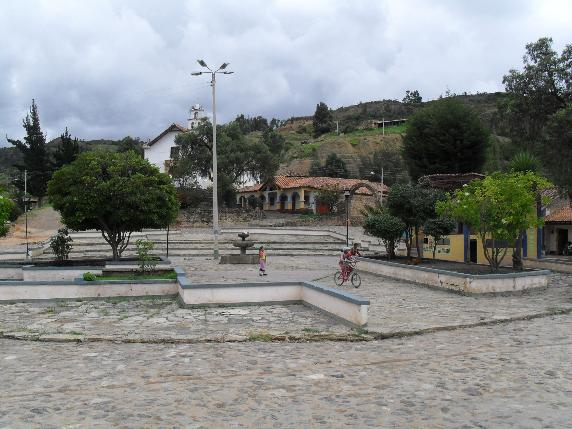 Parque principal del centro urbano del municipio de Chiquiza, Boyacá, Colombia